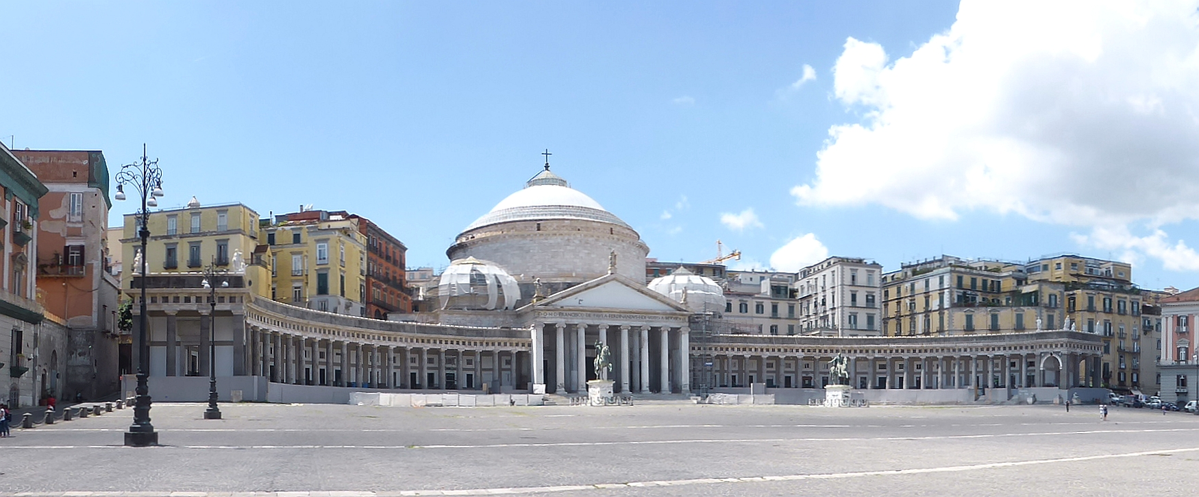 Die Basilika San Francesco di Paola an der Piazza del Plebiscito in Neapel, Italien. Foto Wolfgang Pehlemann P1070687